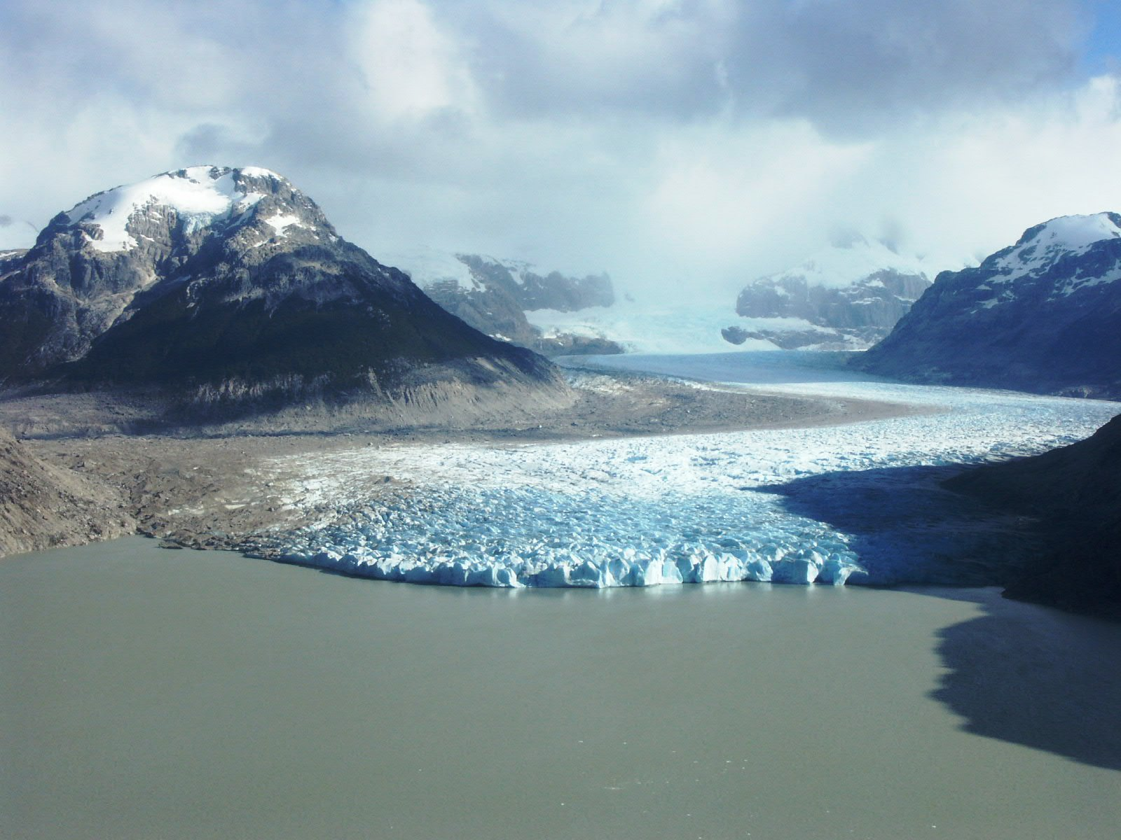 Afluente al río Baker, Aysén, Chile